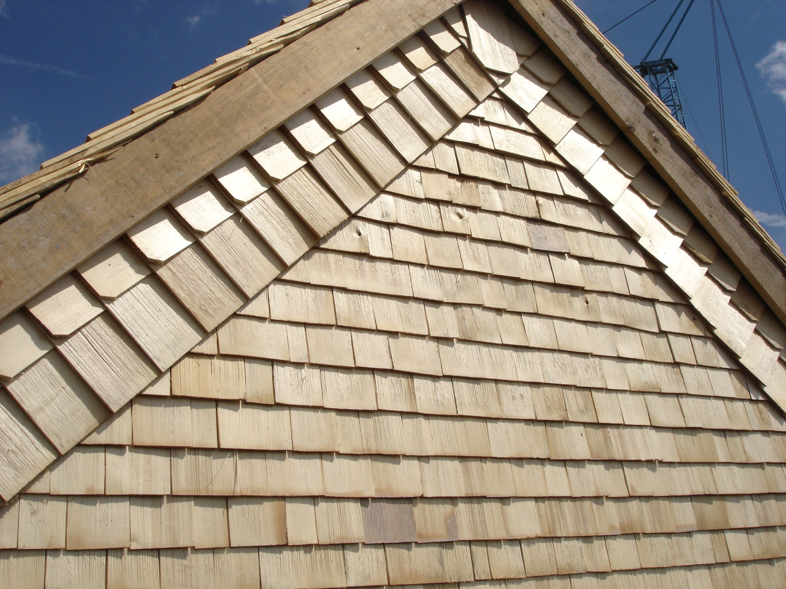 Détail sur les finitions du nouveau bardage en tavaillons sur un grenier fort de fin 1700